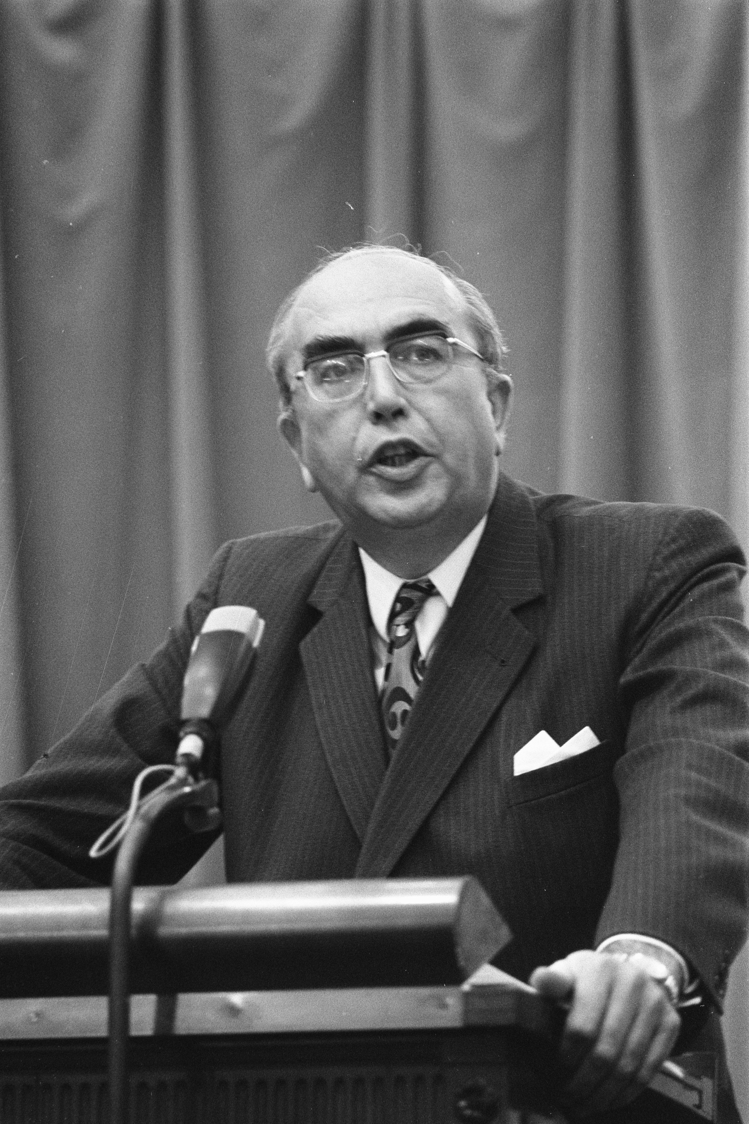 Collectie / Archief : Fotocollectie Anefo Reportage / Serie : [ onbekend ] Beschrijving : Werkloosheidsdebat in Tweede Kamer; kamerlid J.T. Vellenga (PvdA) aan het woord Datum : 22 februari 1972 Locatie : Den Haag, Zuid-Holland Trefwoorden : parlementaire debatten, parlementariërs, politiek, portretten, werkloosheid Persoonsnaam : Vellenga, J.T. Instellingsnaam : PvdA, Tweede Kamer Fotograaf : Mieremet, Rob / Anefo Auteursrechthebbende : Nationaal Archief Materiaalsoort : Negatief (zwart/wit) Nummer archiefinventaris : bekijk toegang 2.24.01.05 Bestanddeelnummer : 925-4016